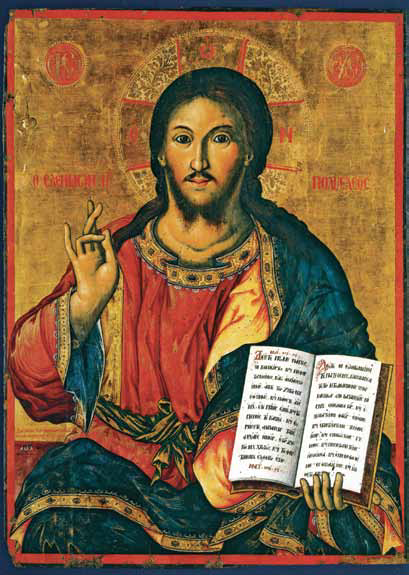 Христос Велик Архиерей, икона на Михаил Анагност от църквата "Свето Благовещение", Тирана